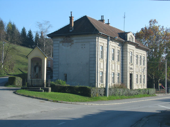 Zgrada stare škole u Pušći, Zagrebačka županija